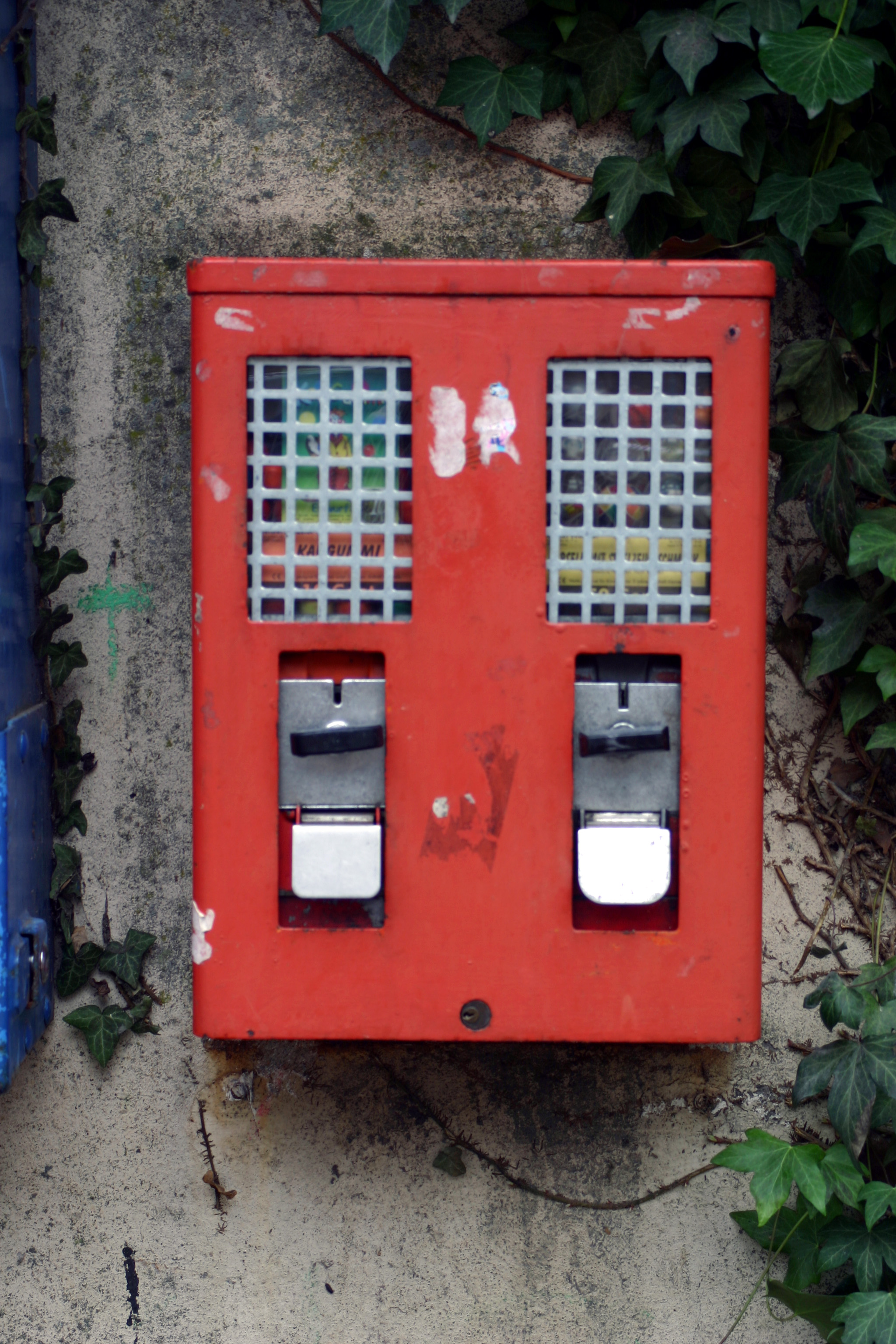 Kaugummiautomat